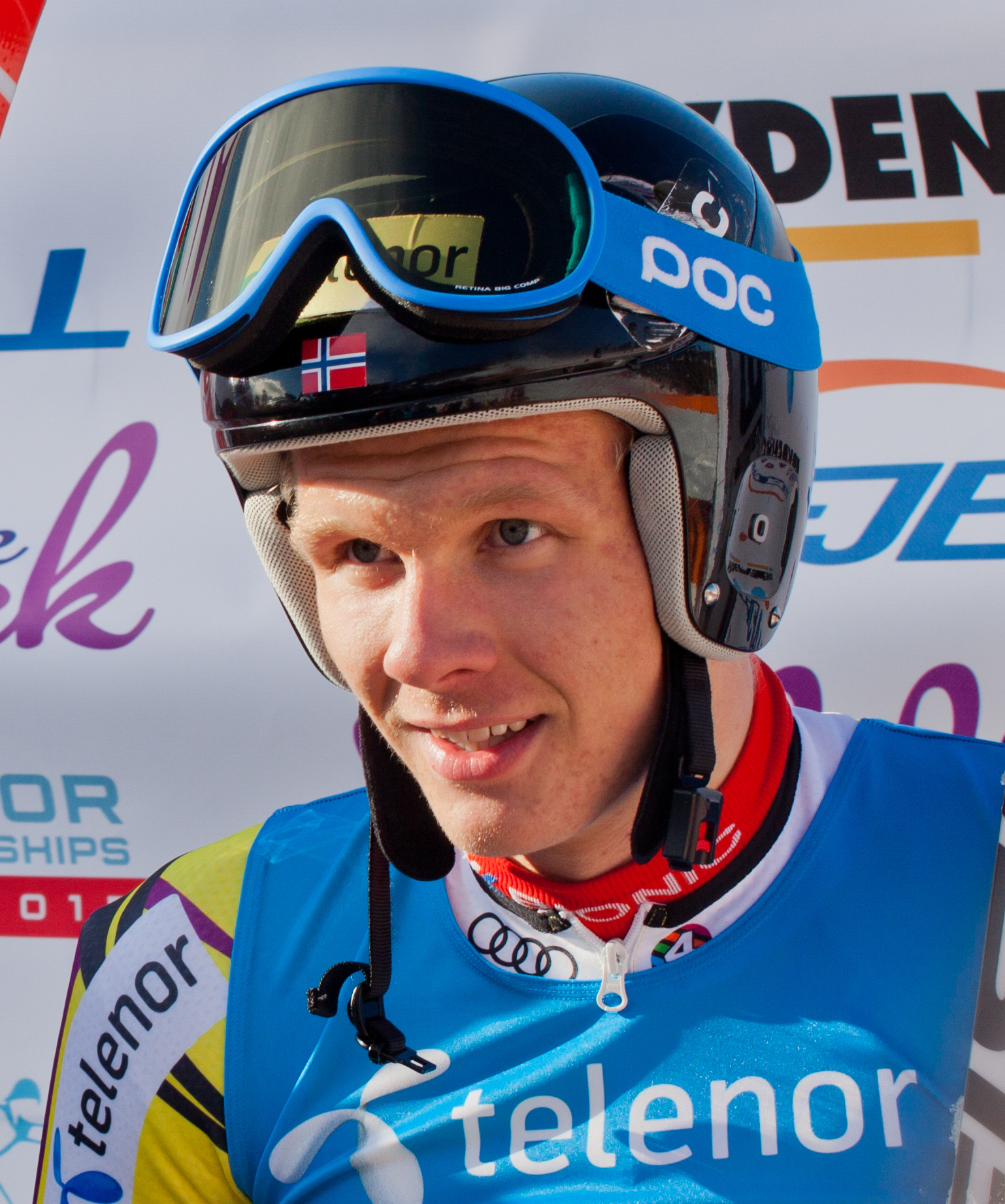 Foto: Caroline Dokken Wendelborg/ NIF